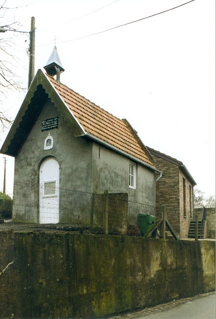 Borgloon Kortestraat zonder nummer